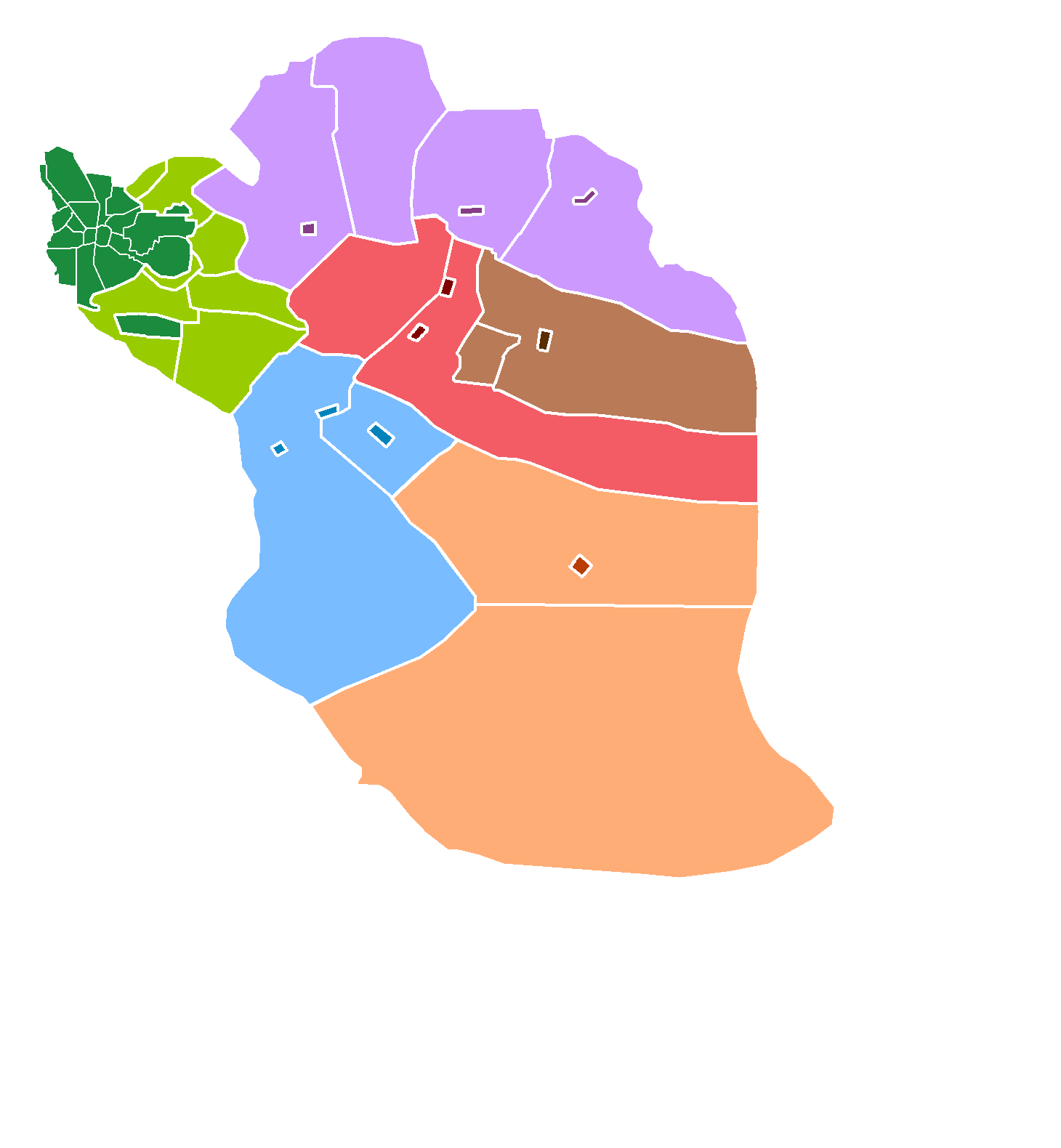 نقشه شهرستان اصفهان